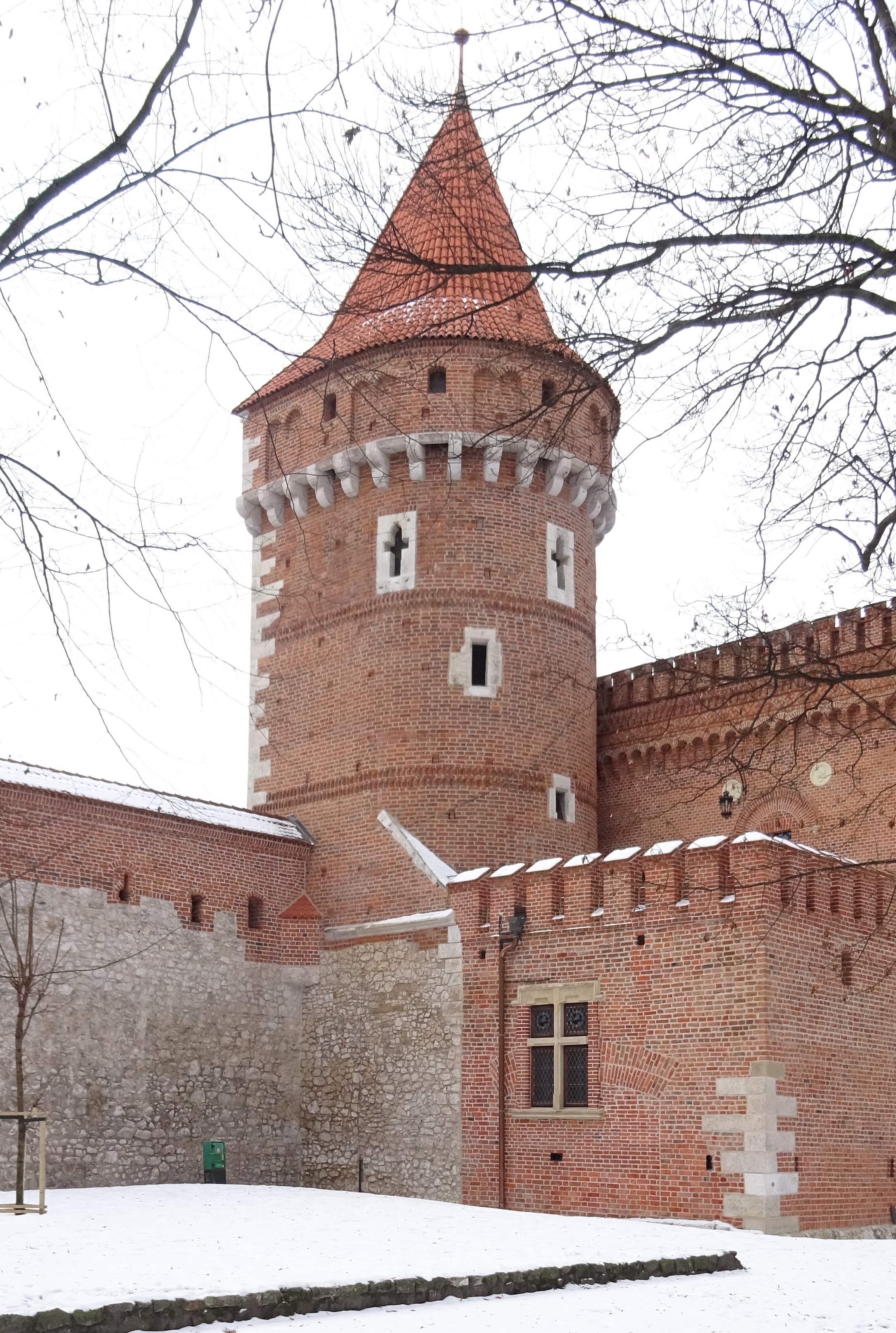 Baszta Stolarzy w Krakowie. Widok zimowy od strony Plant. Po remoncie - 2017.